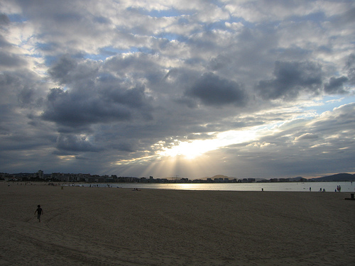 La playa de Laredo en Cantabria.